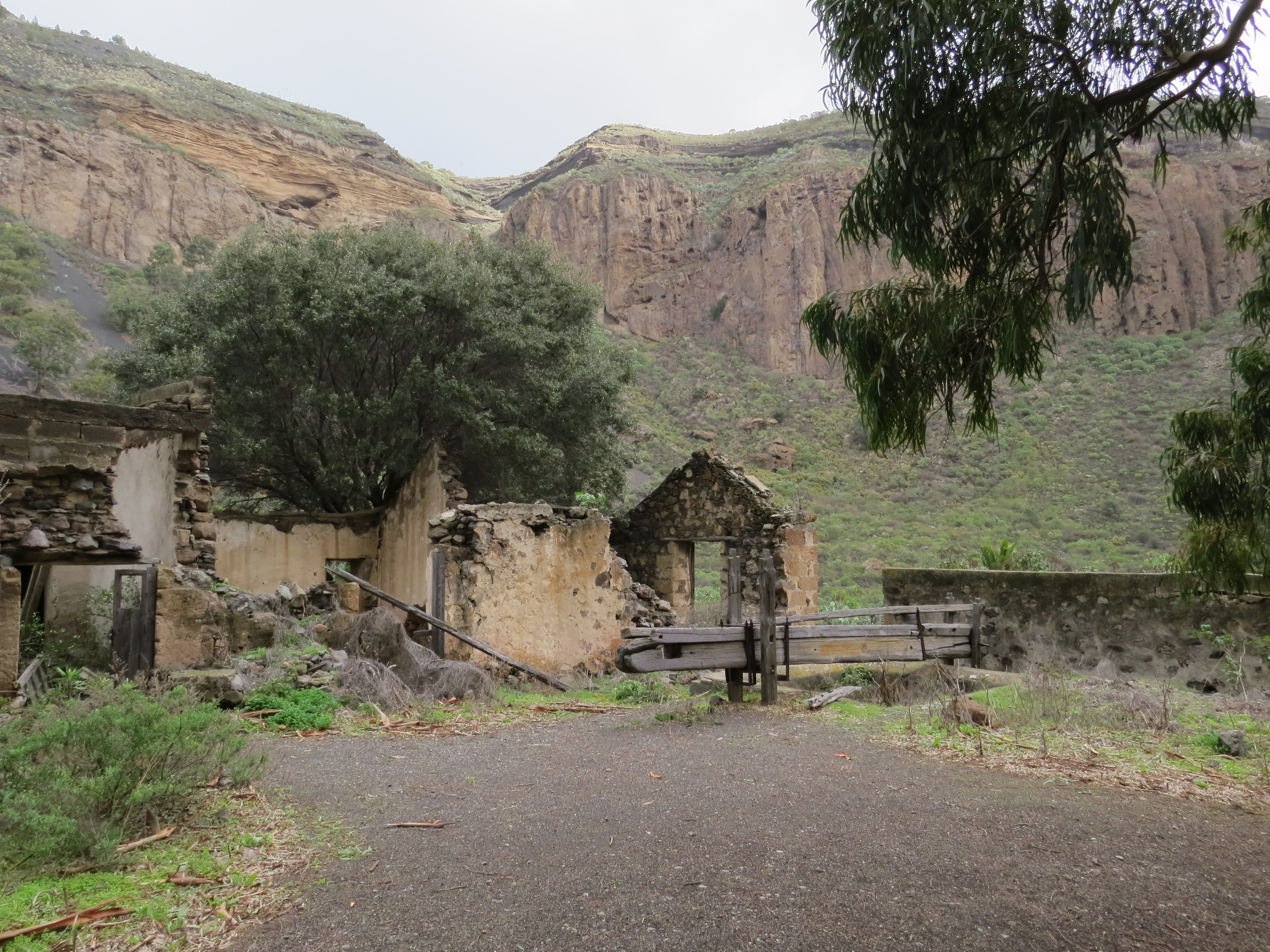 Ruinen im Vulkankrater Caldera de Bandama. Rechts sind Reste einer Weinpresse zu sehen. Gran Canaria, Kanarische Inseln, Spanien